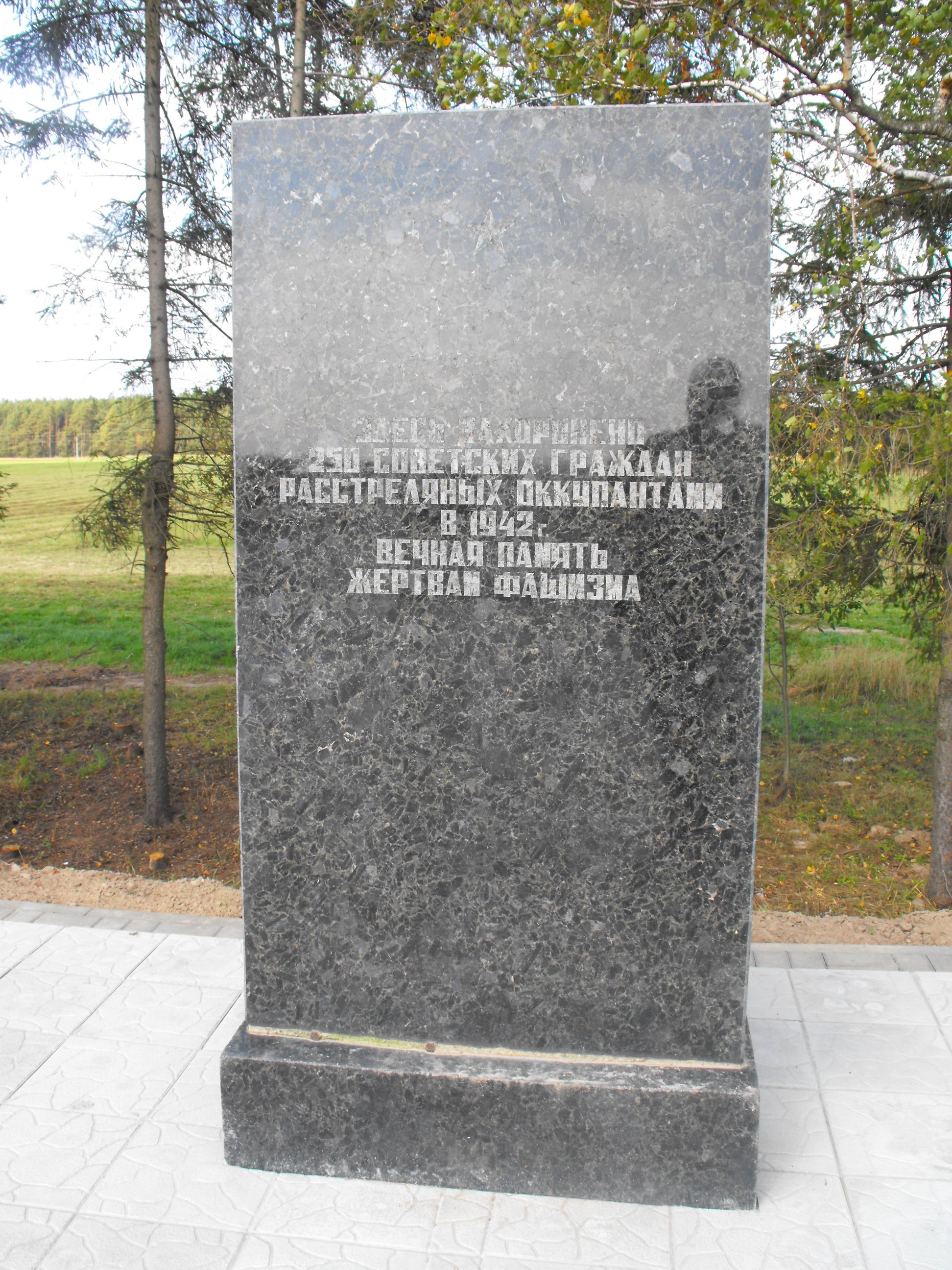 Памятник на месте расстрела в 1942 году 250 березинских евреев. Национальность жертв не упомянута. Находится на обочине трассы Минск-Могилёв между 110 и 111 километрами.